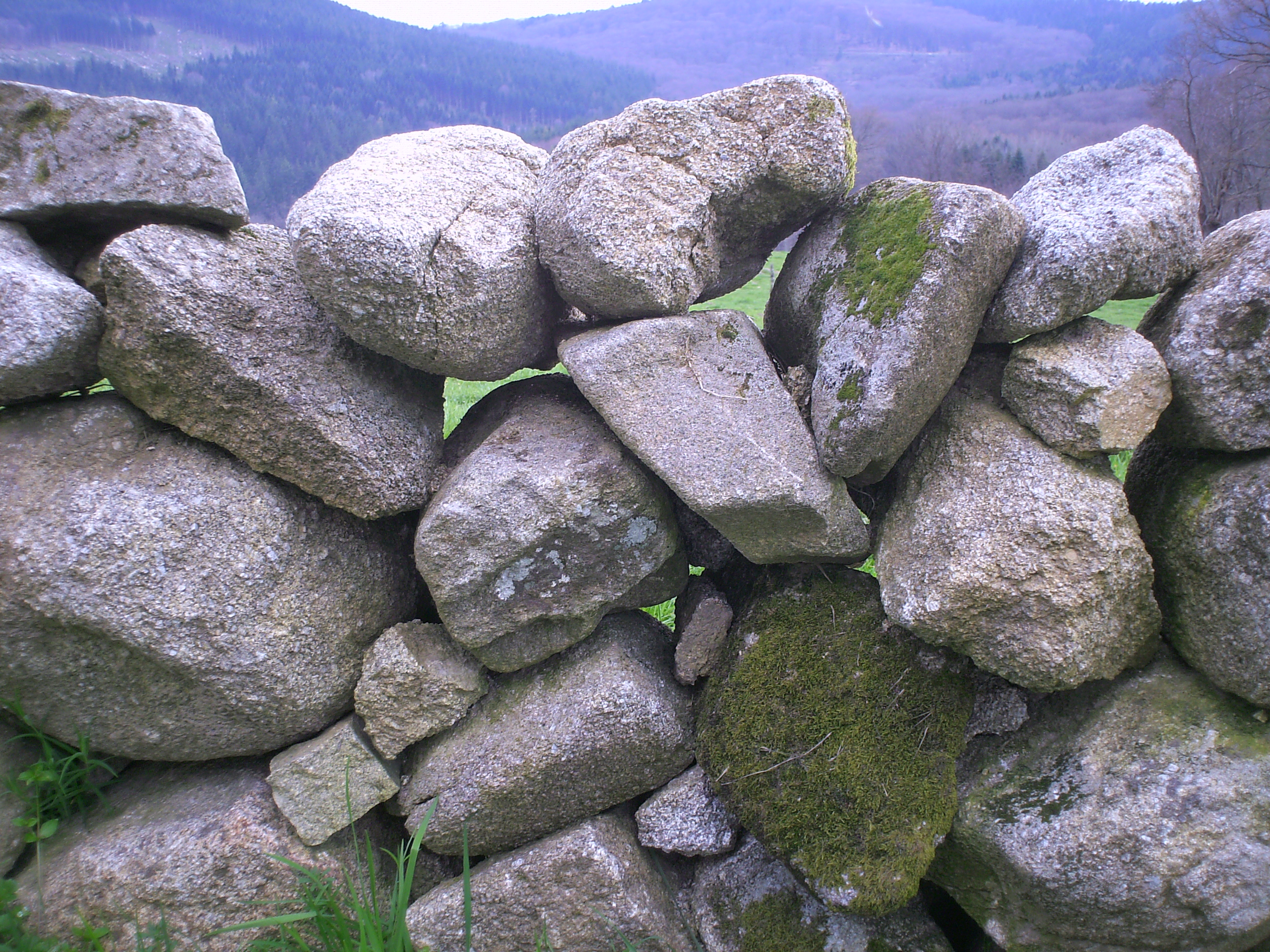 Sainte-Feyre (Creuse) : murette consistant en une épaisseur de pierres arrondies simplement empilées à sec.